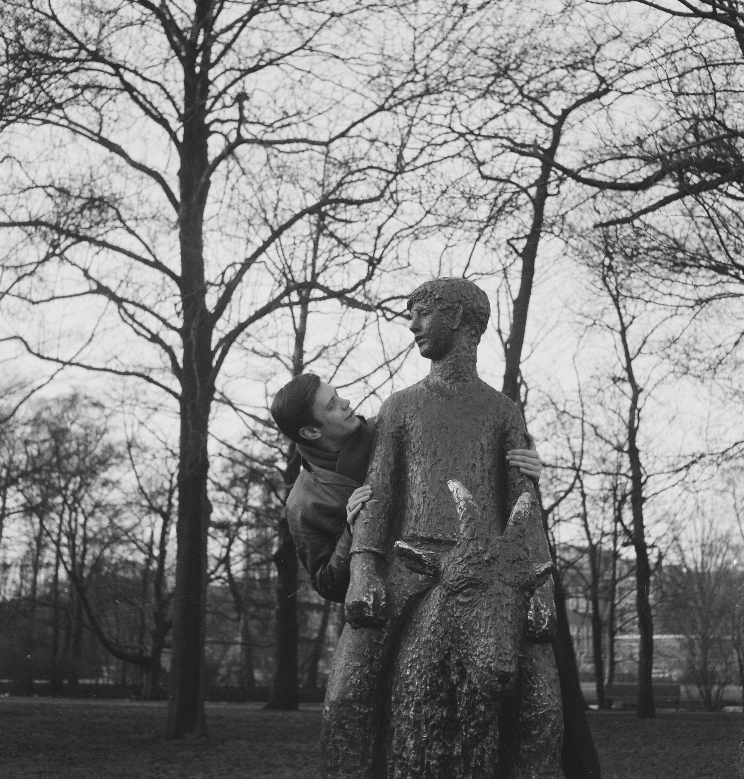 Collectie / Archief : Fotocollectie Anefo Reportage / Serie : [ onbekend ] Beschrijving : Reportage Rob de Nijs buitenopname Oosterpark te Amsterdam Datum : 27 januari 1964 Locatie : Amsterdam, Noord-Holland Persoonsnaam : OOSTERPARK Fotograaf : Smulders, Jean / Anefo Auteursrechthebbende : Nationaal Archief Materiaalsoort : Negatief (zwart/wit) Nummer archiefinventaris : bekijk toegang 2.24.01.03 Bestanddeelnummer : 915-9941